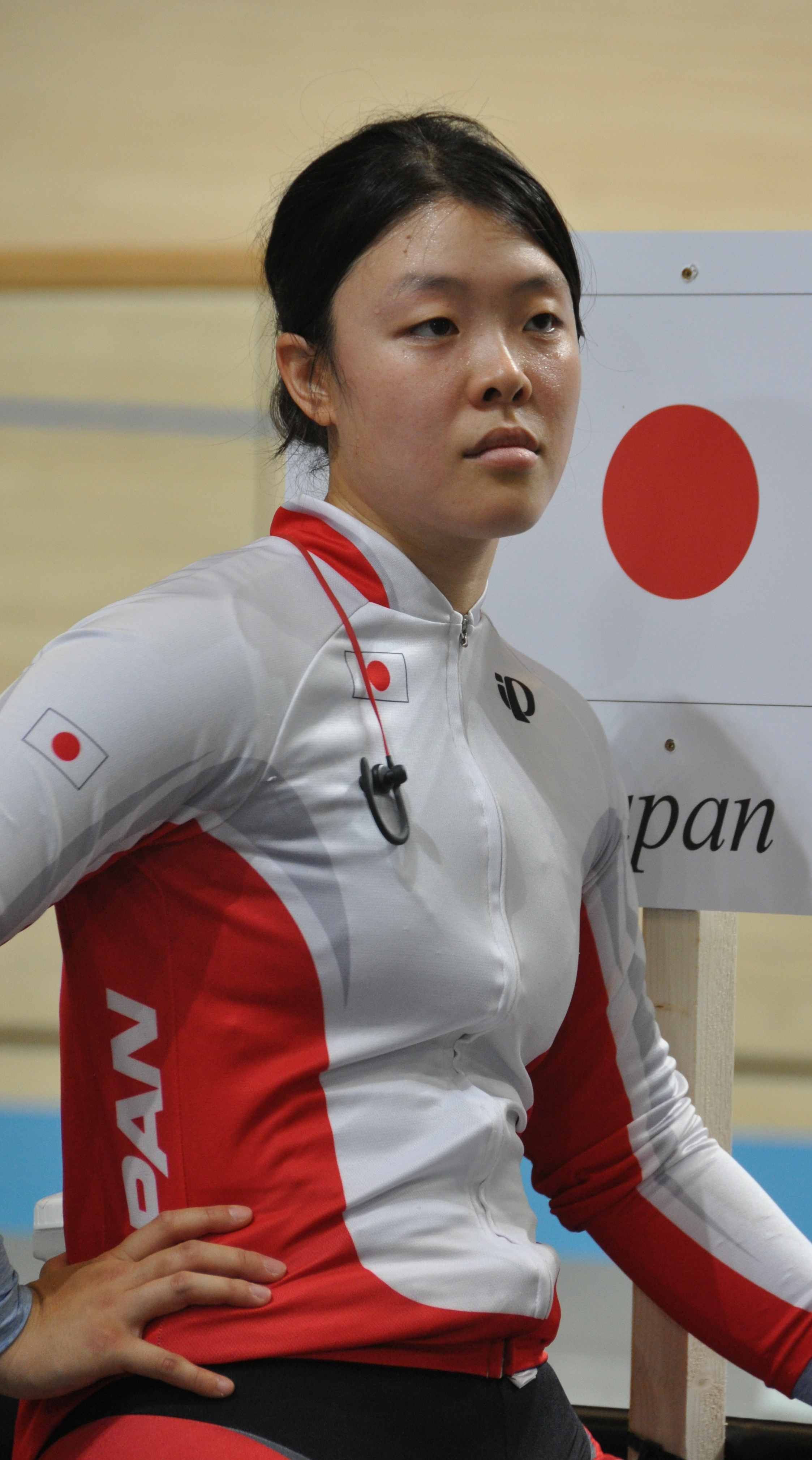 Kayono Maeda, japanische Radsportlerin